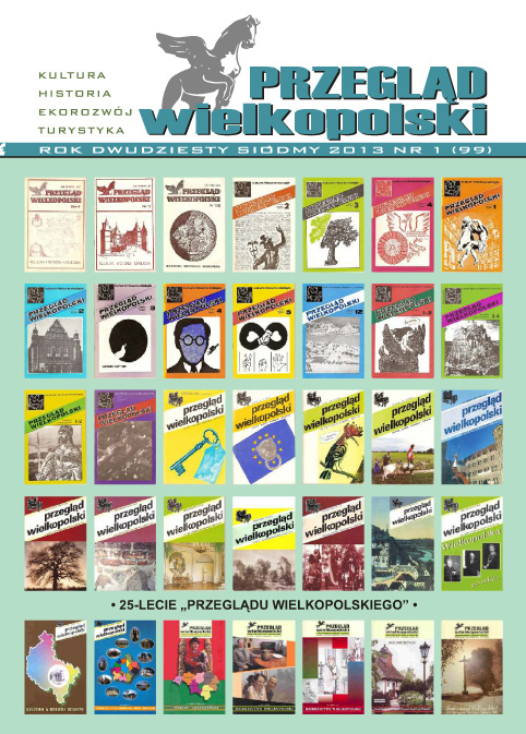 Okładka nr 1 (99) z 2013 roku kwartalnika "Przegląd Wielkopolski" wydawanego przez Wielkopolskie Towarzystwo Kulturalne w Poznaniu